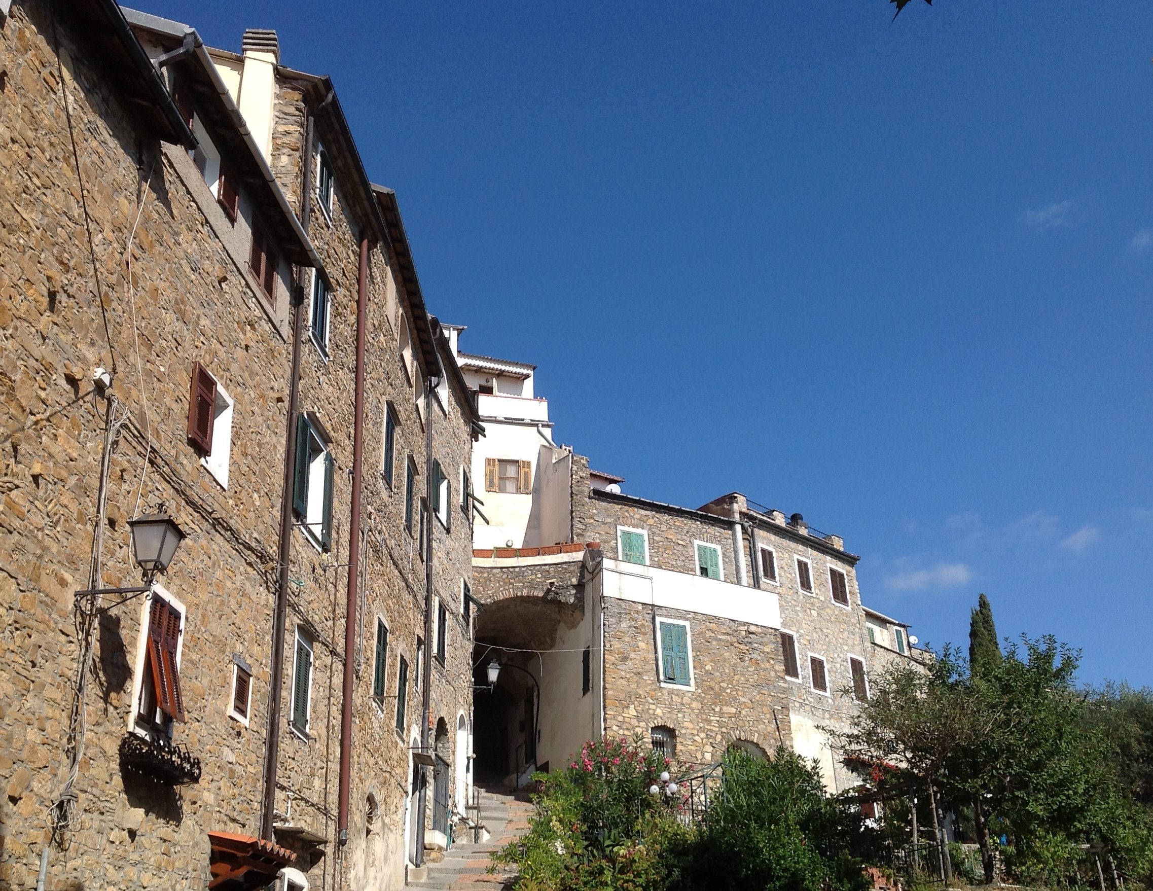 Cipressa